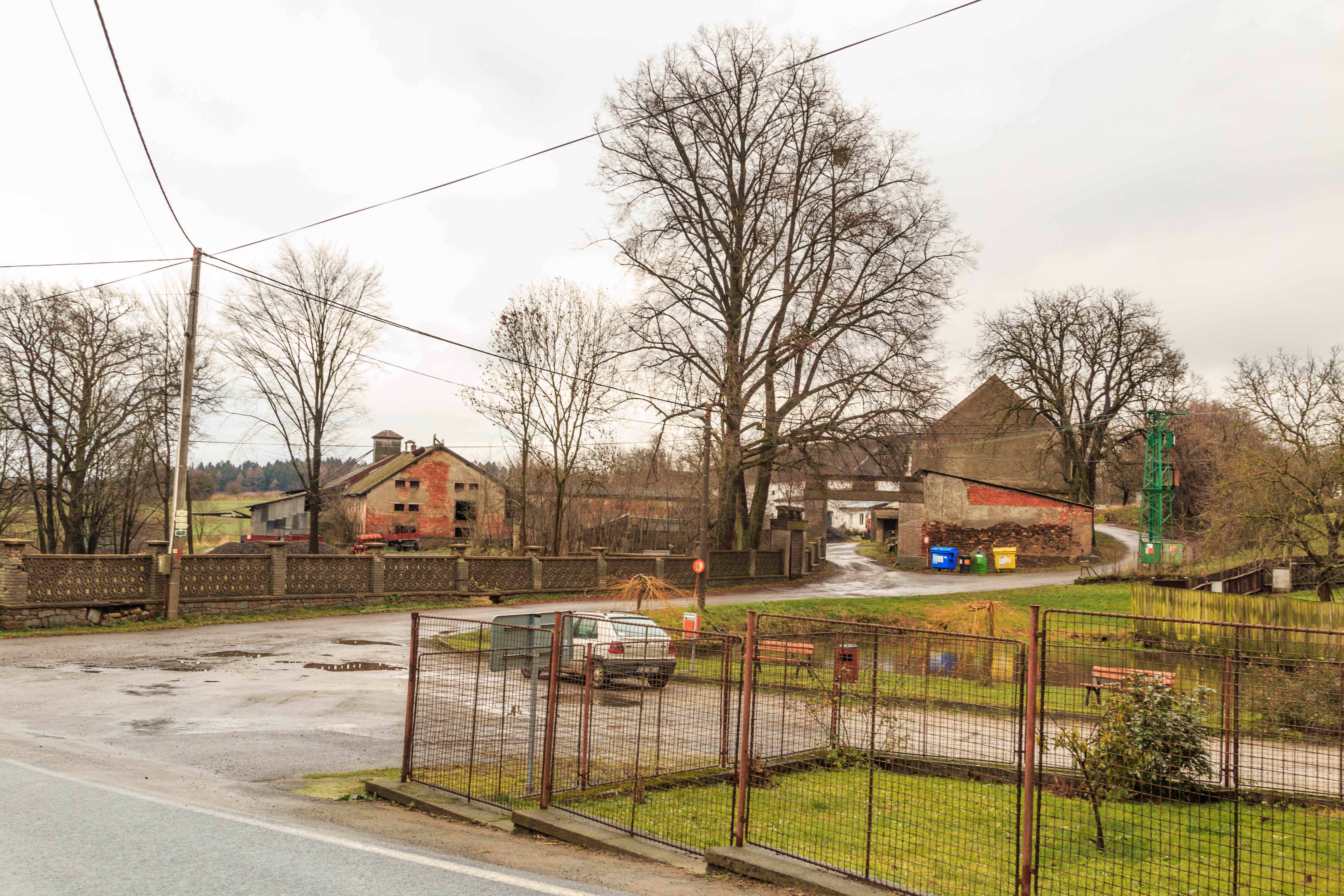 Bačkov pohled na místo bývalého zámku